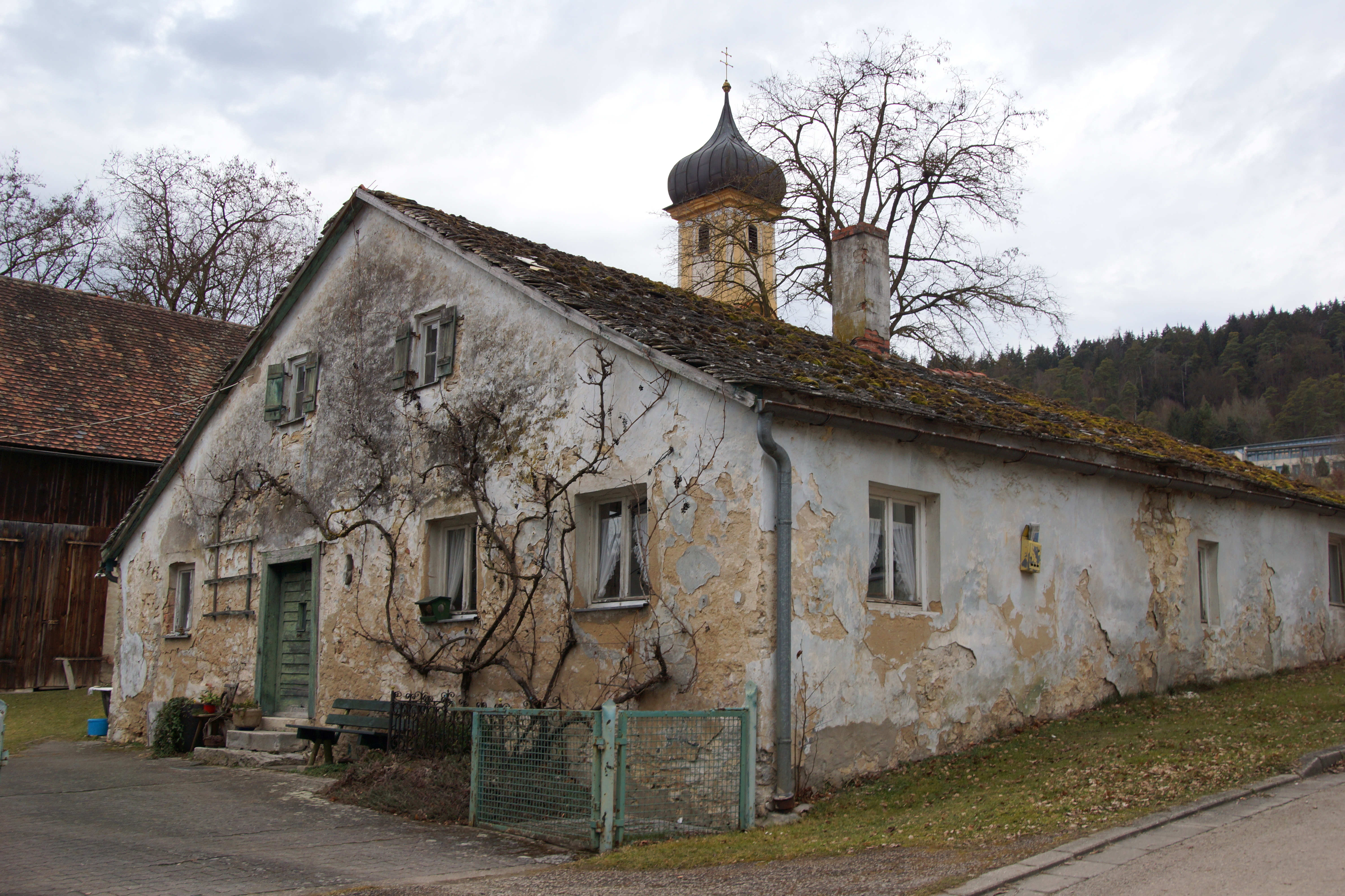 Leising bei Beilngries an der Altmühl